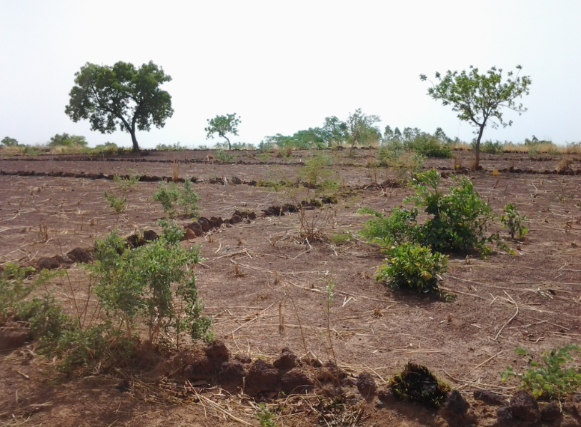 Montre les cordons pierreux installés à Péyiri pour empêcher l'érosion hydrique.